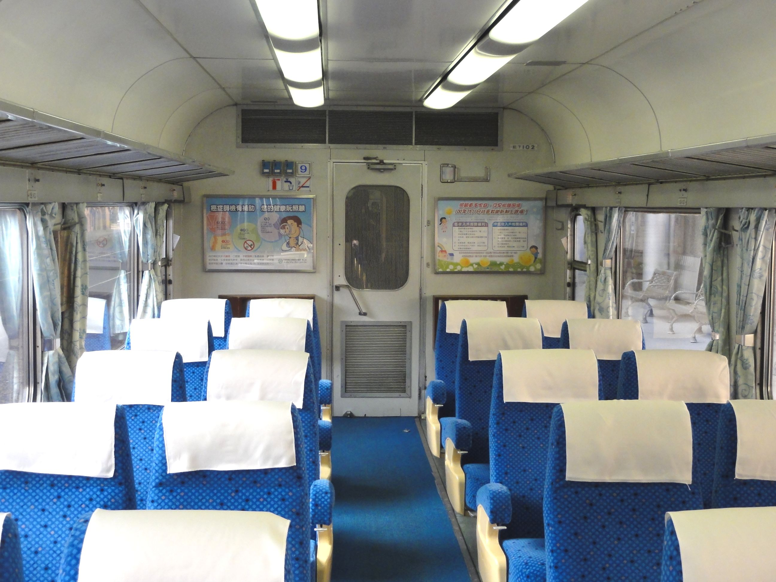 台湾鉄路管理局EMU100型電車ET102内部。